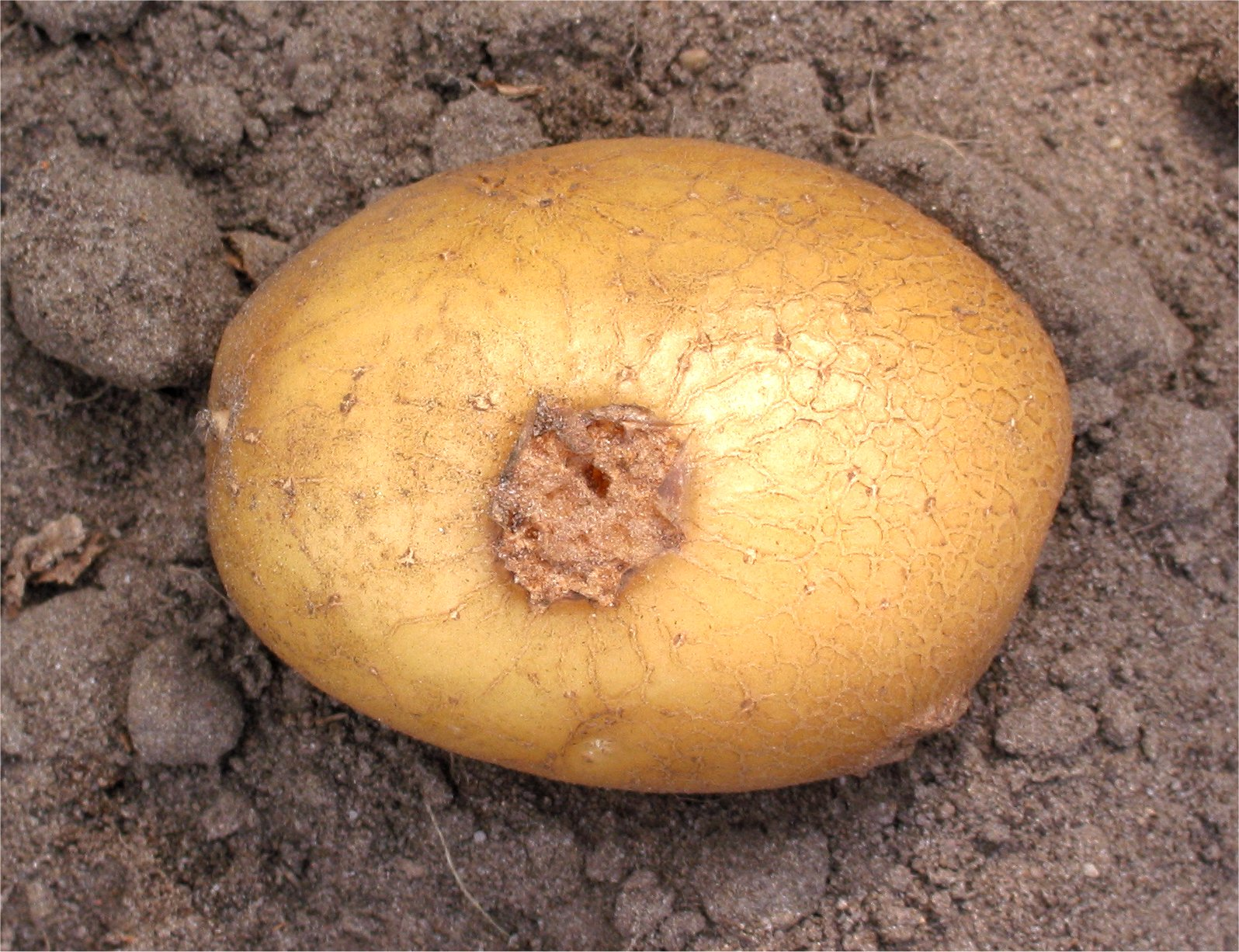 Aardappelschurft op 'Doré') (Streptomyces scabies on potato variety 'Doré'